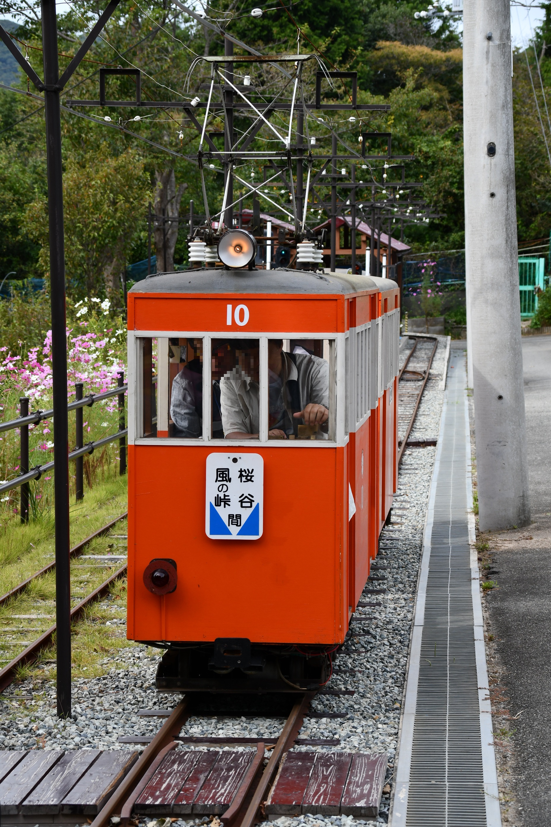 2017/10/1桜谷軽便鉄道南山線にて撮影。 肖像権保護のため画像の一部を加工。